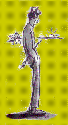 Dessin satirique de Jacques Lebaudy.